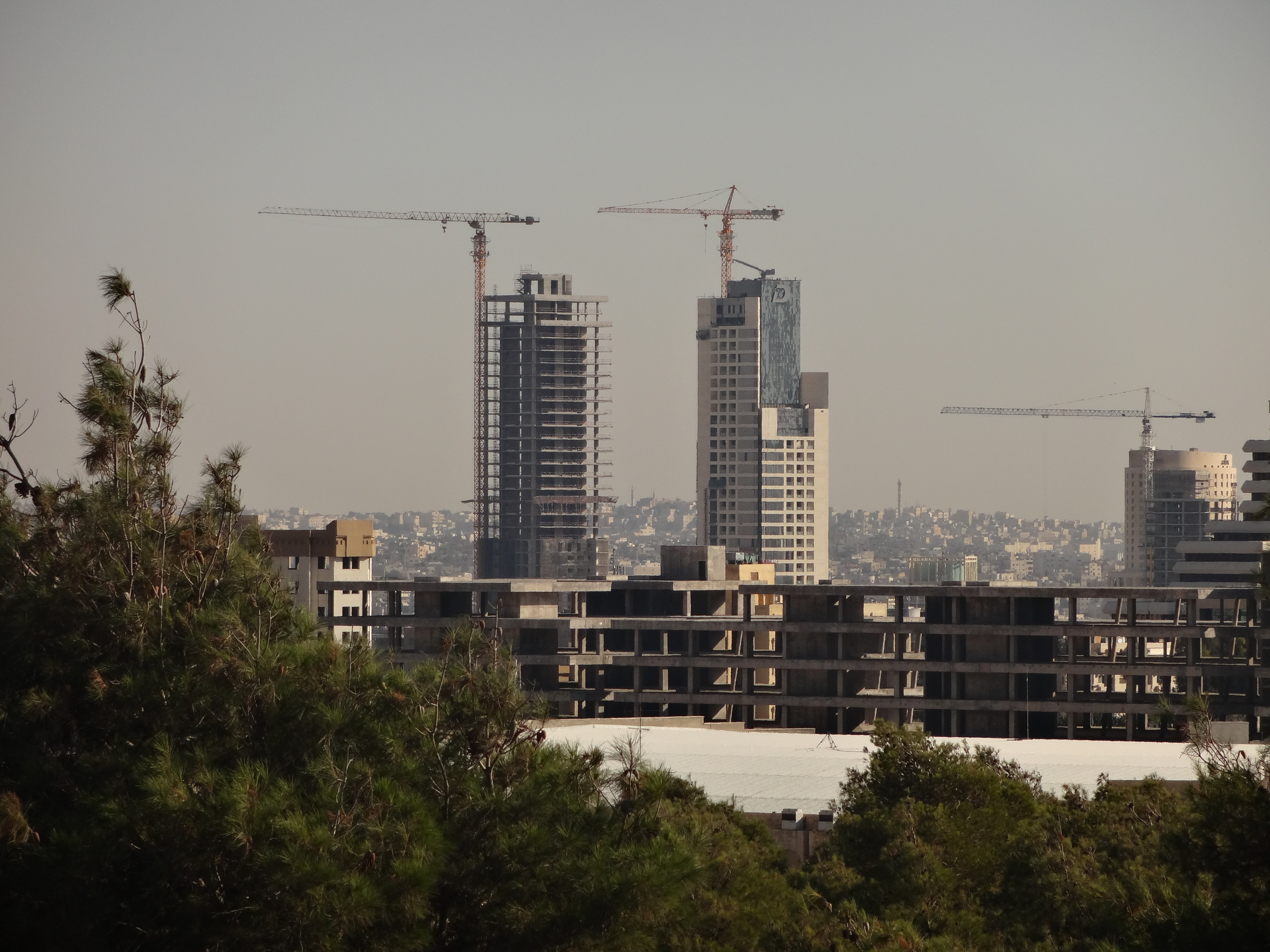 Abdali Project 1, Amman, Jordan